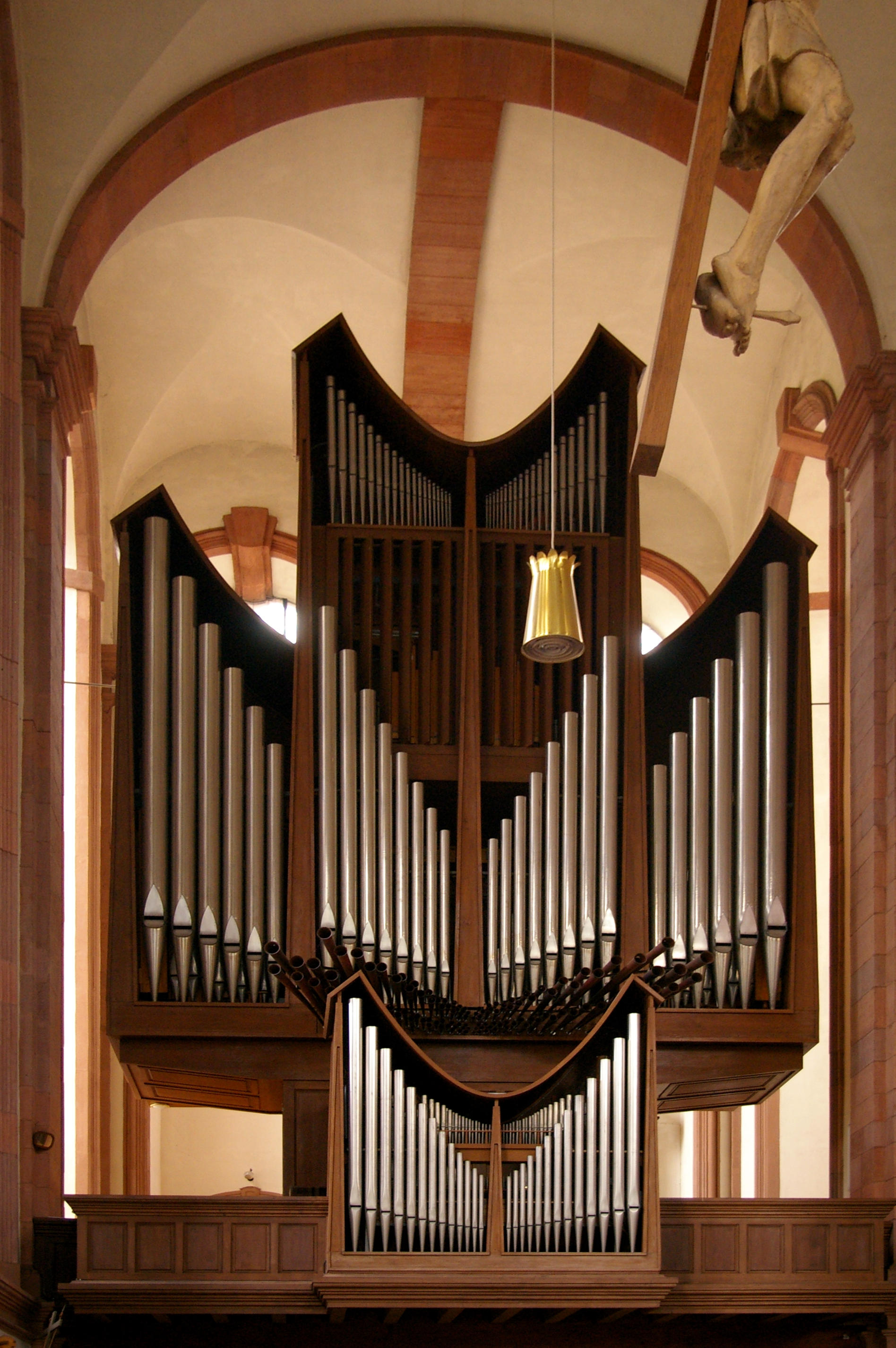 Abbaye d'Himmerod : stalles et maître-autel